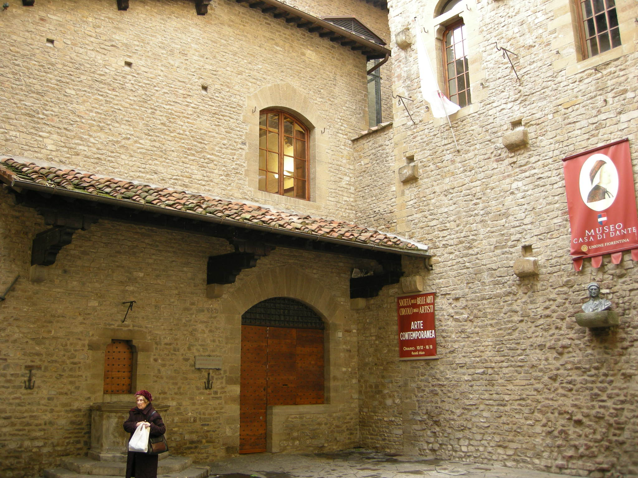 Casa di dante 00